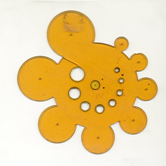 Wzornik, przyrząd kreślarski Own work